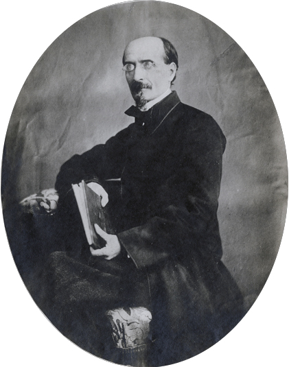 Ventura Ruiz Aguilera. Número de inventario: FD01112.